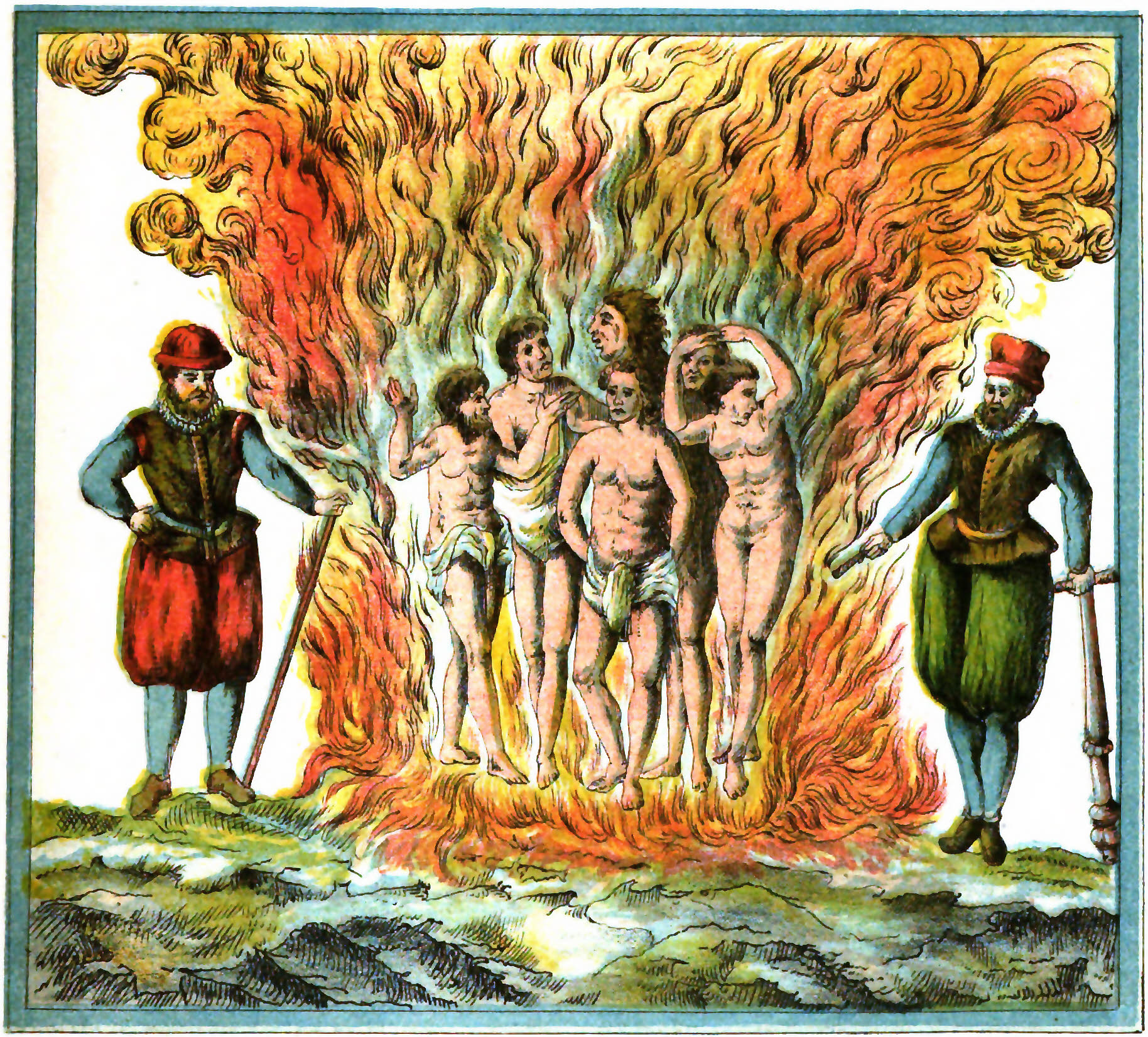 Moeurs des Indiens tel que décrites par Champlain dans ses mémoires de voyage dans le golfe du Mexique. «Quant aux autres Indiens qui sont sous la domination du Roy d'Espaigne, s'il n'y donnoit ordre, ils seroient en aussy barbare creance comme les autres. Au commencement de ses conquestes, il auoit establi l'inquiíltion entre eux, & les rendoit esclaues ou faisoit cruellement mourir en fy grand nombre, que le recit seulement en faict pityé. Ce mauuais traittement eítoit cause que les pauures Indiens, pour la prehension d'iceluy, s'enfuioient aux montaignes comme desesperés, & d'autant d'Espaignols qu'ils attrapoient, ils les mangeoient ; & pour ceste occaíion lesdicts Espaignols furent contraints leur oster ladicte inquisition, & leur donner liberté de leur personne, leur donnant vne reigle de viure plus doulce & tolerable, pour les faire venir à la cognoissance de Dieu & la creance de la saincte Eglise : car s'ils les vouloient encor chatier selon la rigeur de ladicte inquiíition, ils les feroient tous mourir par le feu. » Tiré du BRIEF DISCOVRS DES CHOSES PLVS REMARQVABLES QVE SAMMVEL CHAMPLAIN DE BROVAGE A reconneues aux Indes Occidentalles Au voiage qu'il en a faict en icelles en l'année 1599 et en l'année 1601.